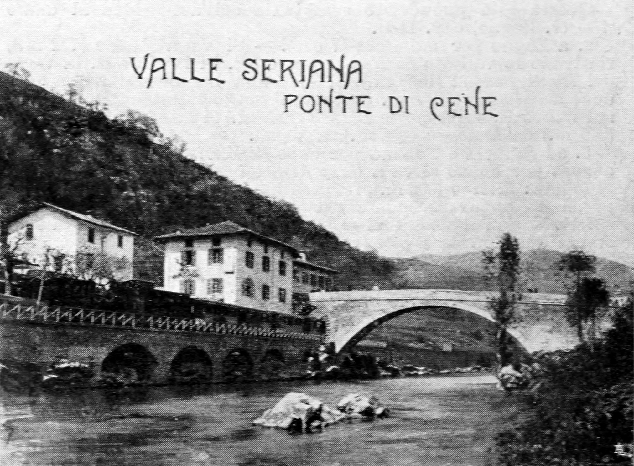 Immagine dal libro Bergamo e sue valli, Brescia e sue valli, Lago d'Iseo, Valcamonica, Società Anonima Guide Lampugnani, Milano, 1900 - Cene